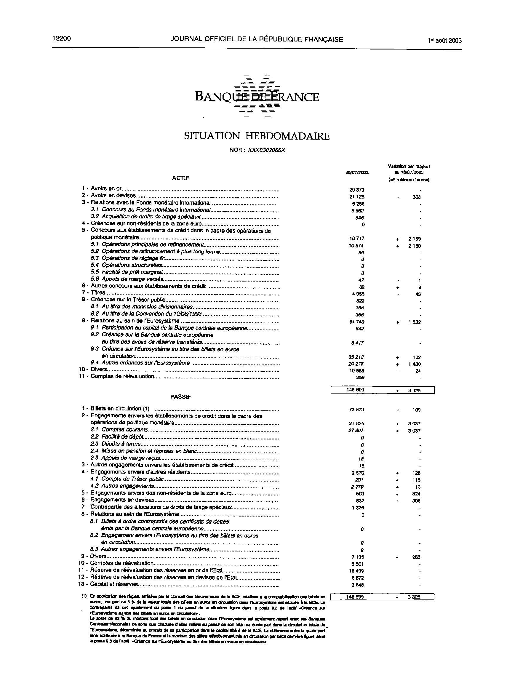 Dernière édition de la situation hebdomadaire de la Banque de France